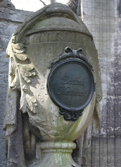 Grab von Berthold Kempinski (1843-1910) auf dem Jüdischen Friedhof Berlin-Weißensee (Ausschnitt).